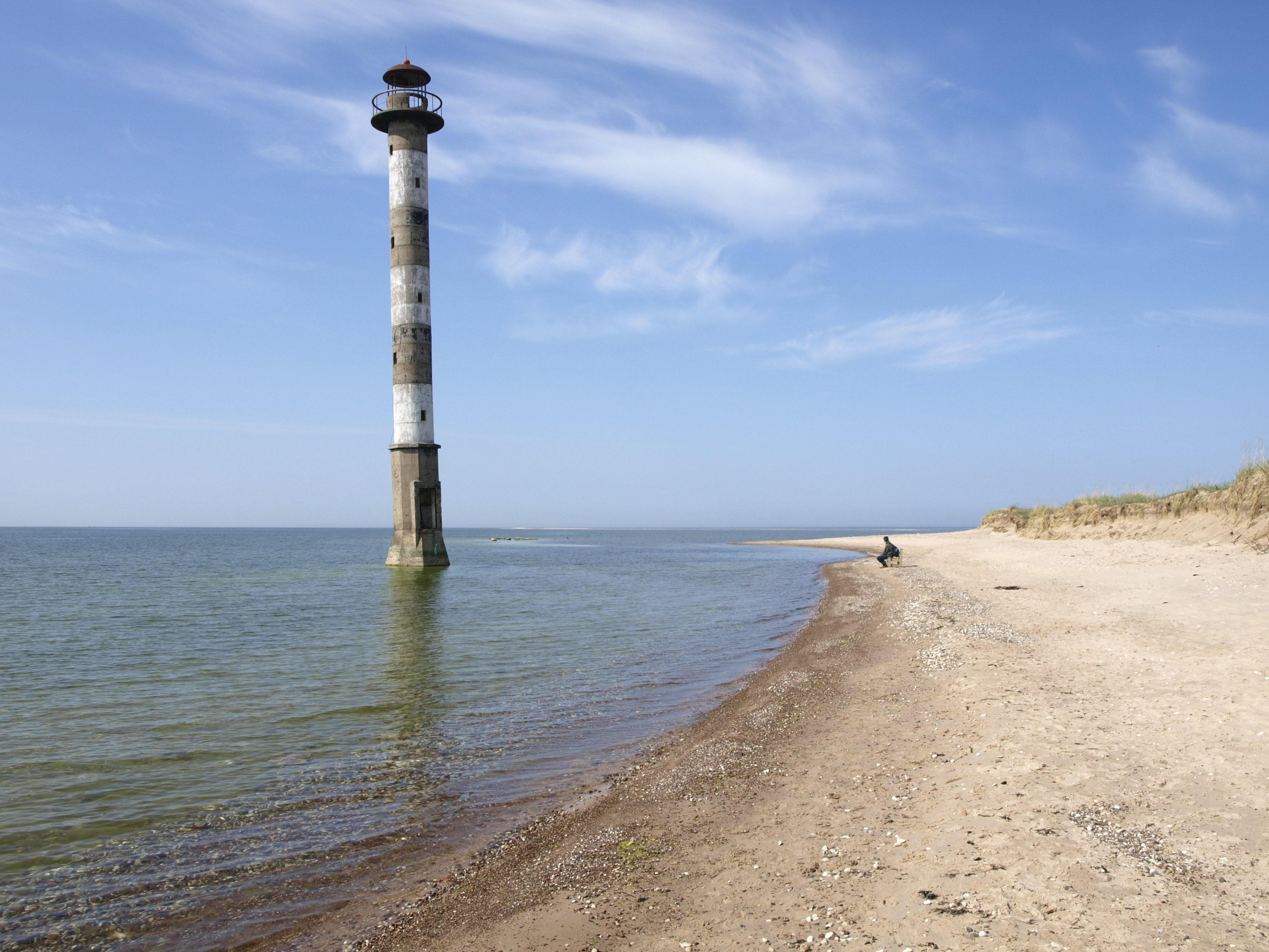 Kiipsaare nukk ja Kiipsaare tuletorn 2008. aastal